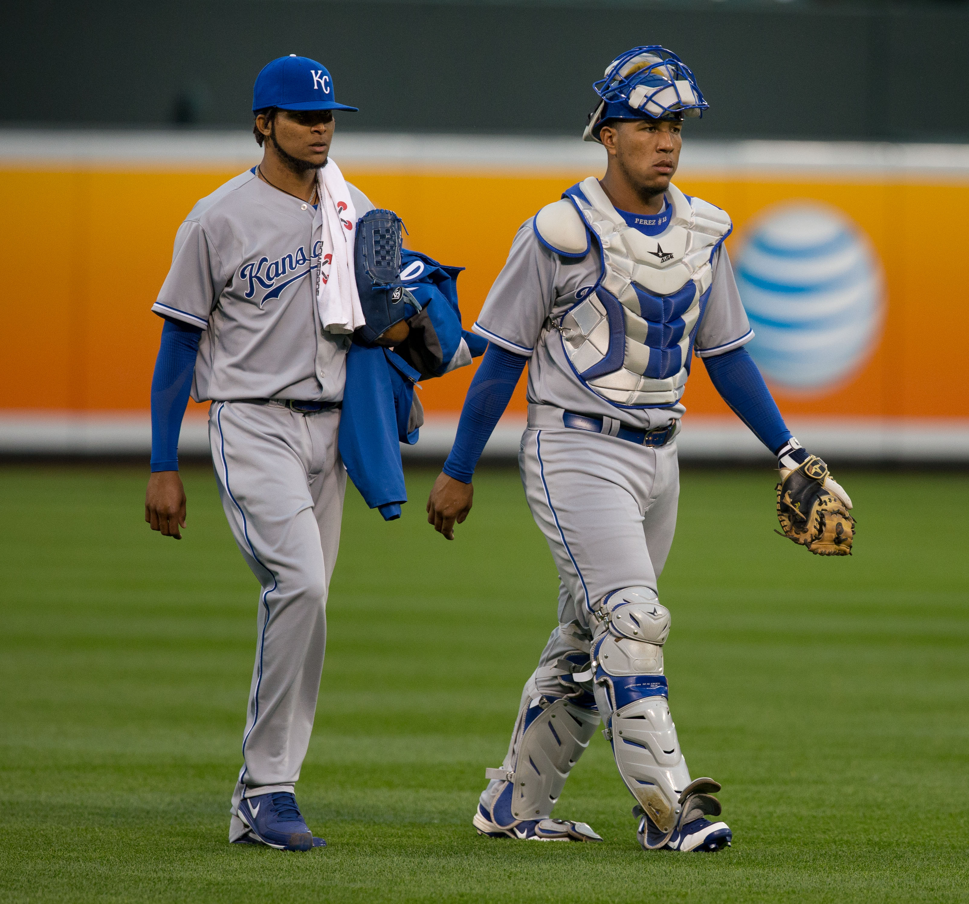 Ervin Santana (left) and Salvador Pérez